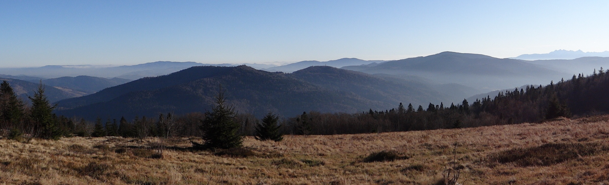 Panorama z polany Skalne na Jasieniu